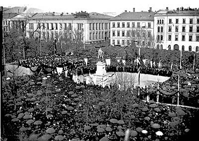 Fra avdukinga av Wergelandsmonumentet i Kristiania